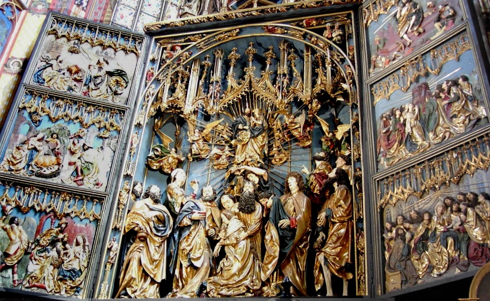 Gothic Altar from Veit Stoß in Krakau / Poland